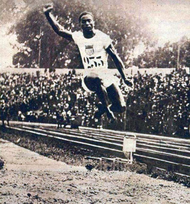 L'étudiant William DeHart Hubbard, vainqueur du saut en longueur aux JO 1924.